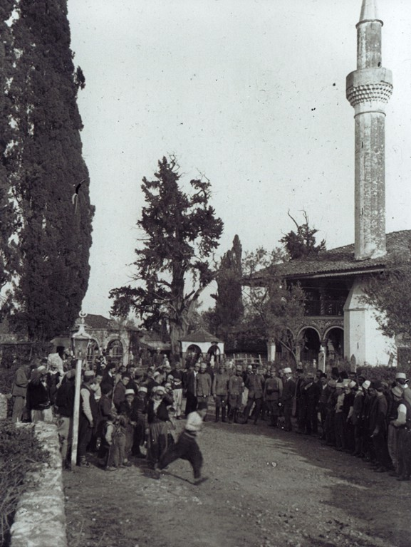 DMM A20 Tirana. View of Mosque of Sulejman Pasha. ca. 1914. / Tiranë. Pamje e Xhamisë së Sulejman pashës (Xhamia e Vjetër). Rreth 1914.